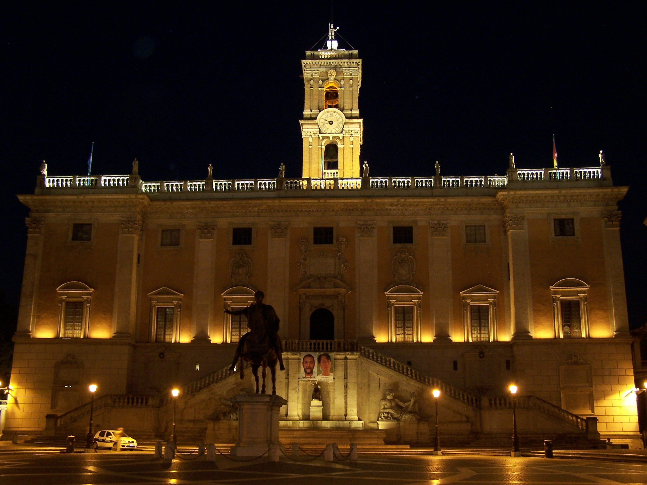 Palazzo del Campidoglio